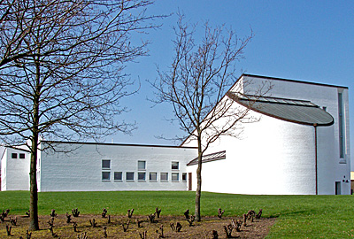 Skelager Kirke Skejby, Århus Nord, Denmark